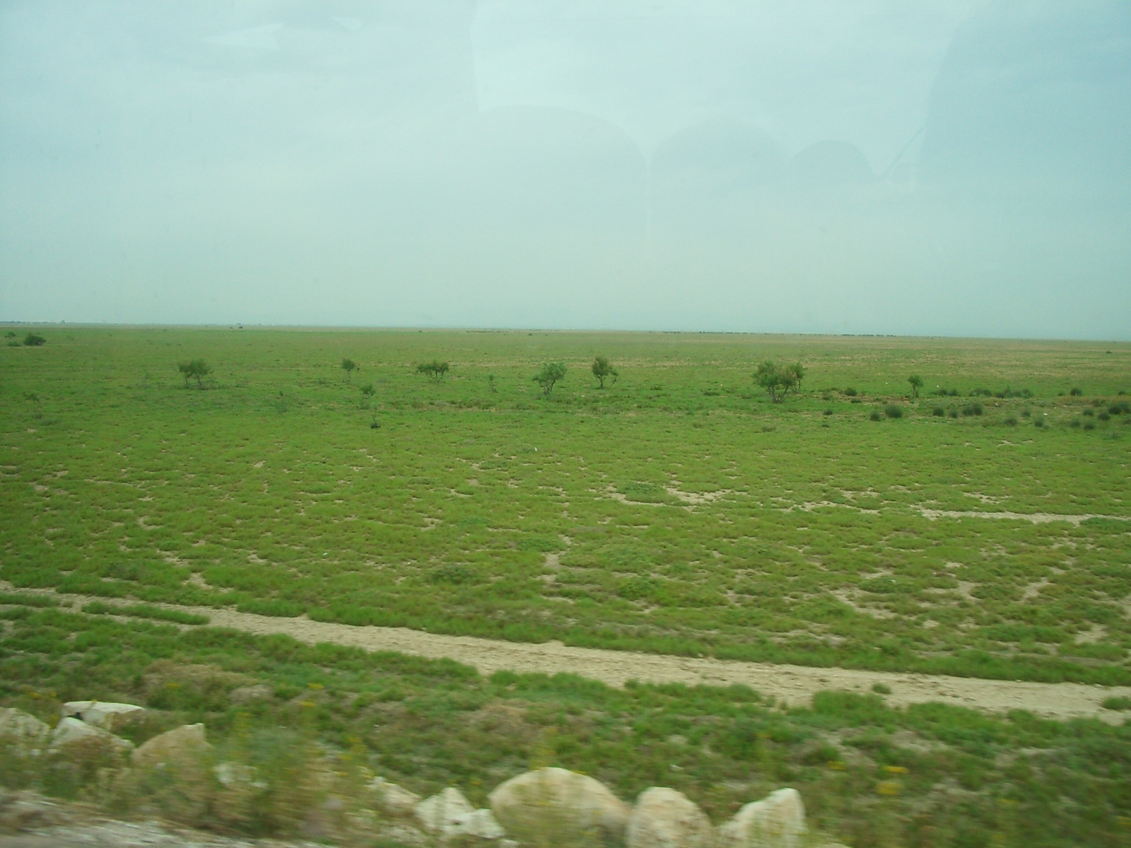 Paissatge de Kairuan Nord